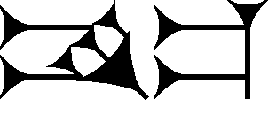 Cuneiform sign